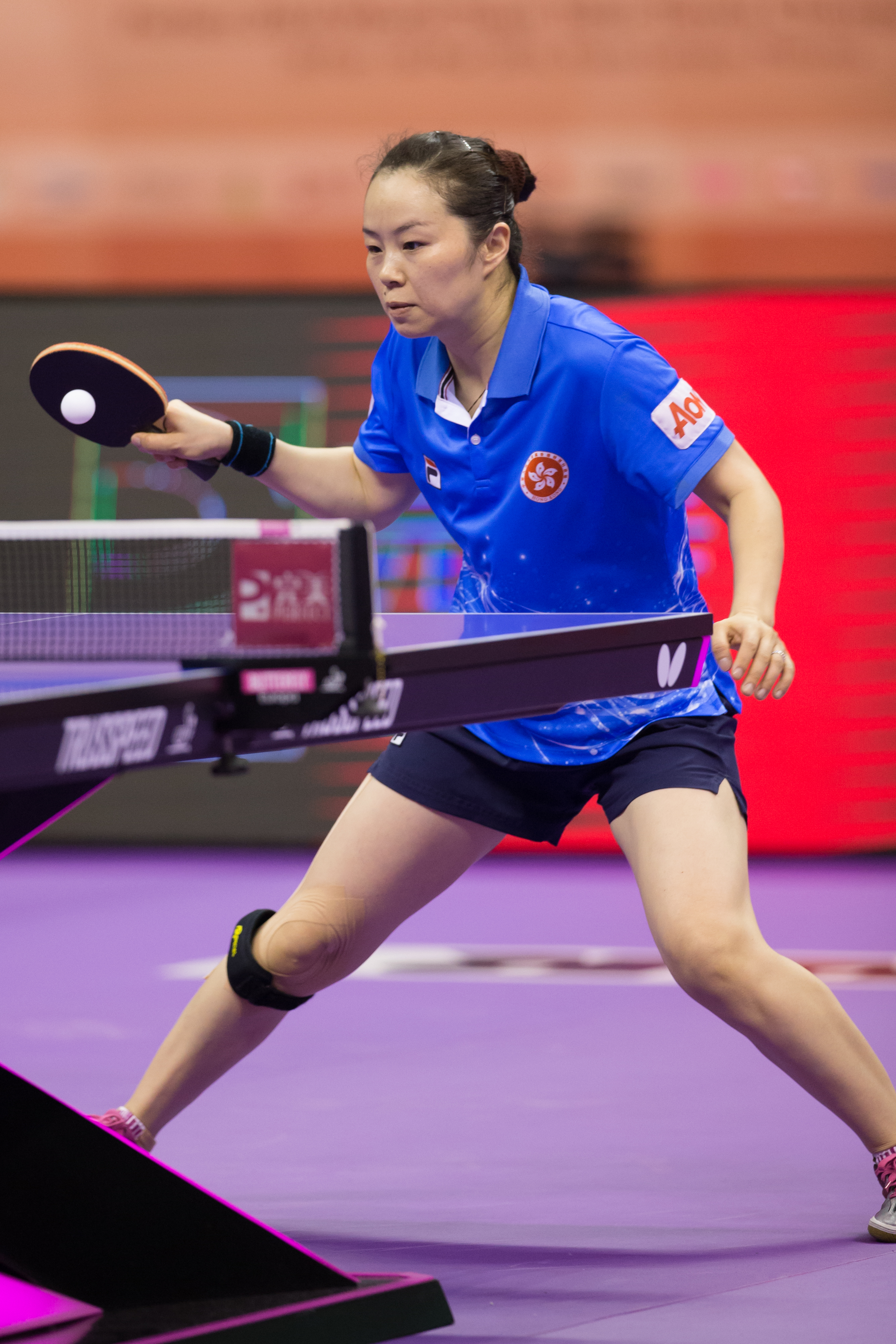 _K0K2751